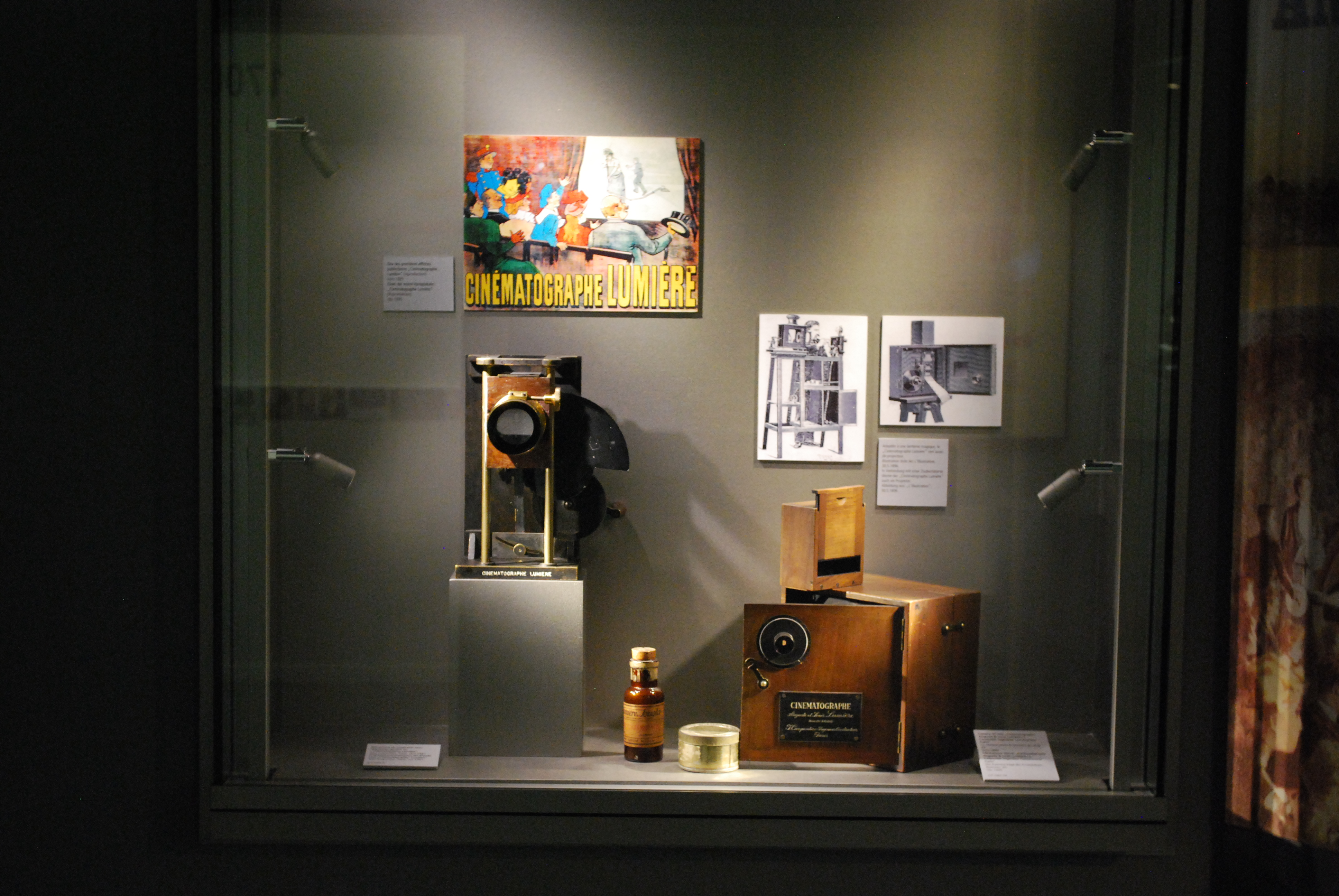 Photographie d'une vitrine de l'exposition: "Technique de l'illusion. De la lanterne magique au cinéma", présentée au NMB Nouveau Musée Bienne. Photo: Xavier Meyer